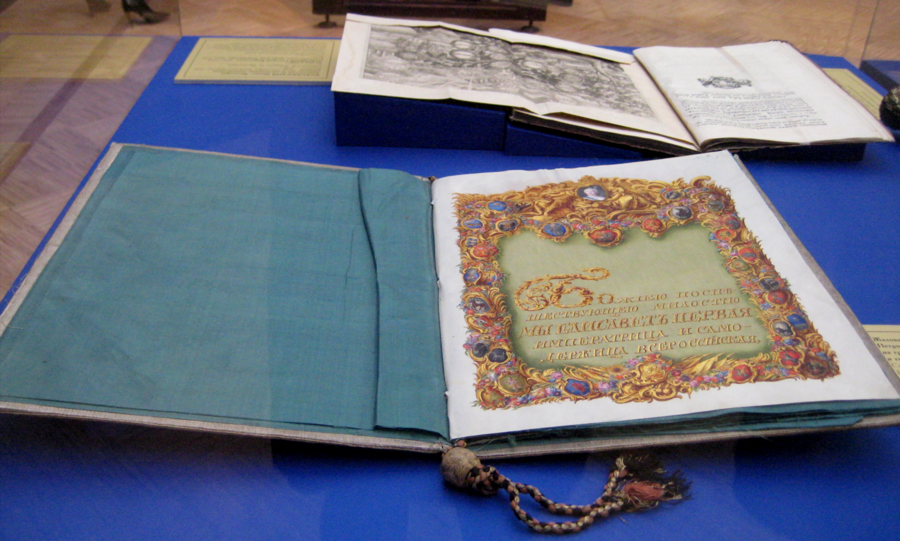 Жалованная грамота императрицы Елизаветы Петровны Алексею Григорьевичу Разумовскому на графское достоинство Российской империи достоинство и герб. 1 марта 1751 года. Санкт-Петербург. Рукопись 18 века. ГИМ